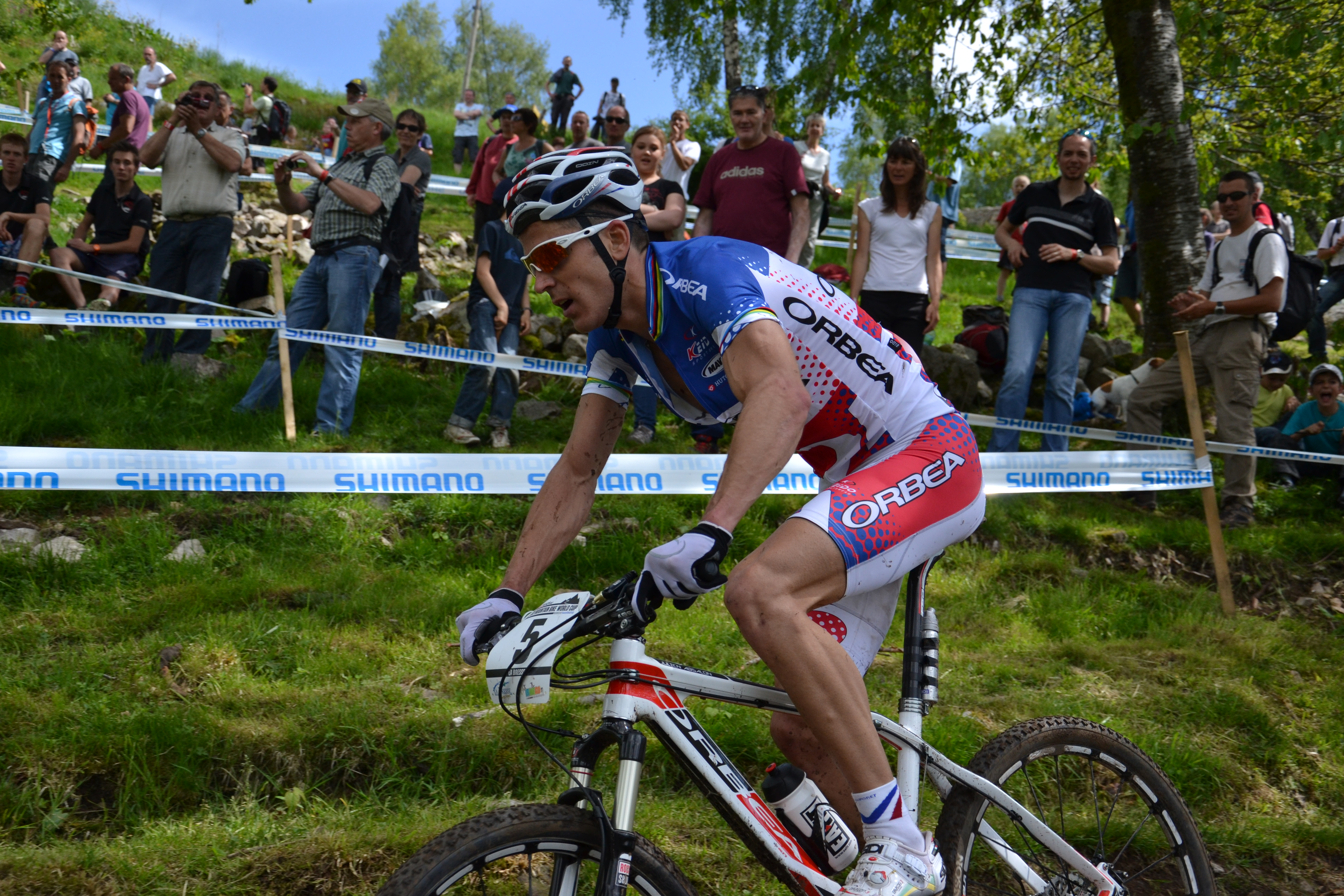 Julien Absalon lors de la 4e manche de la coupe du monde UCI de VTT 2012 à La Bresse (FRA).